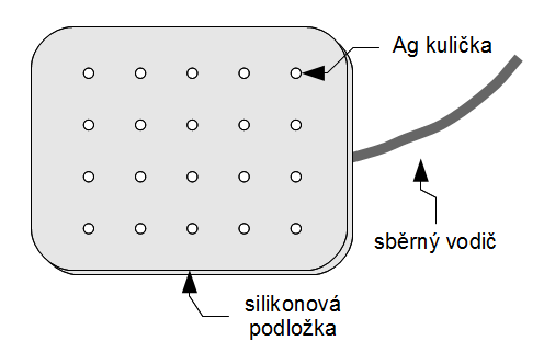 EMG povrchová multielktroda - grid